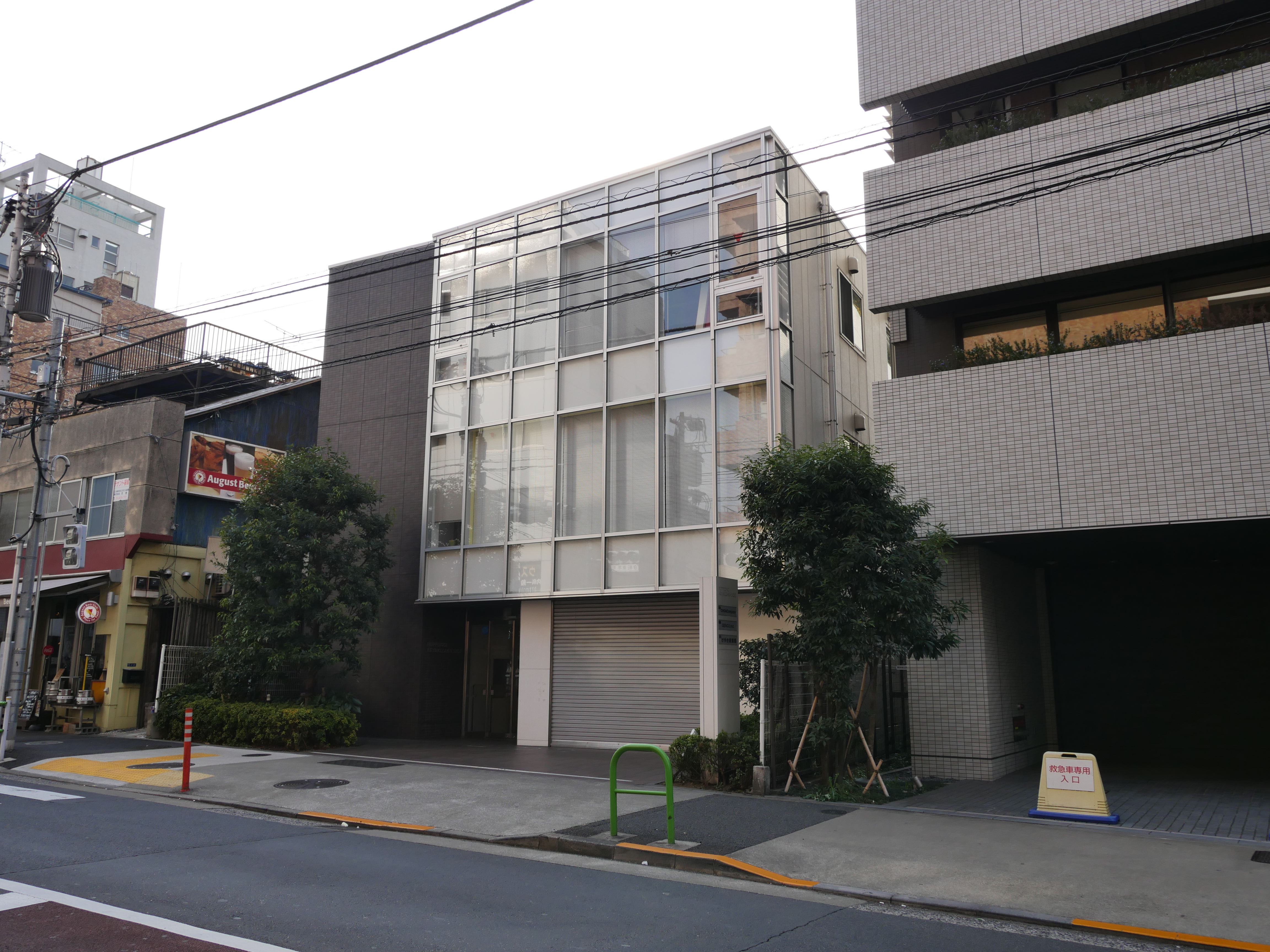 六本木けやき坂サイド